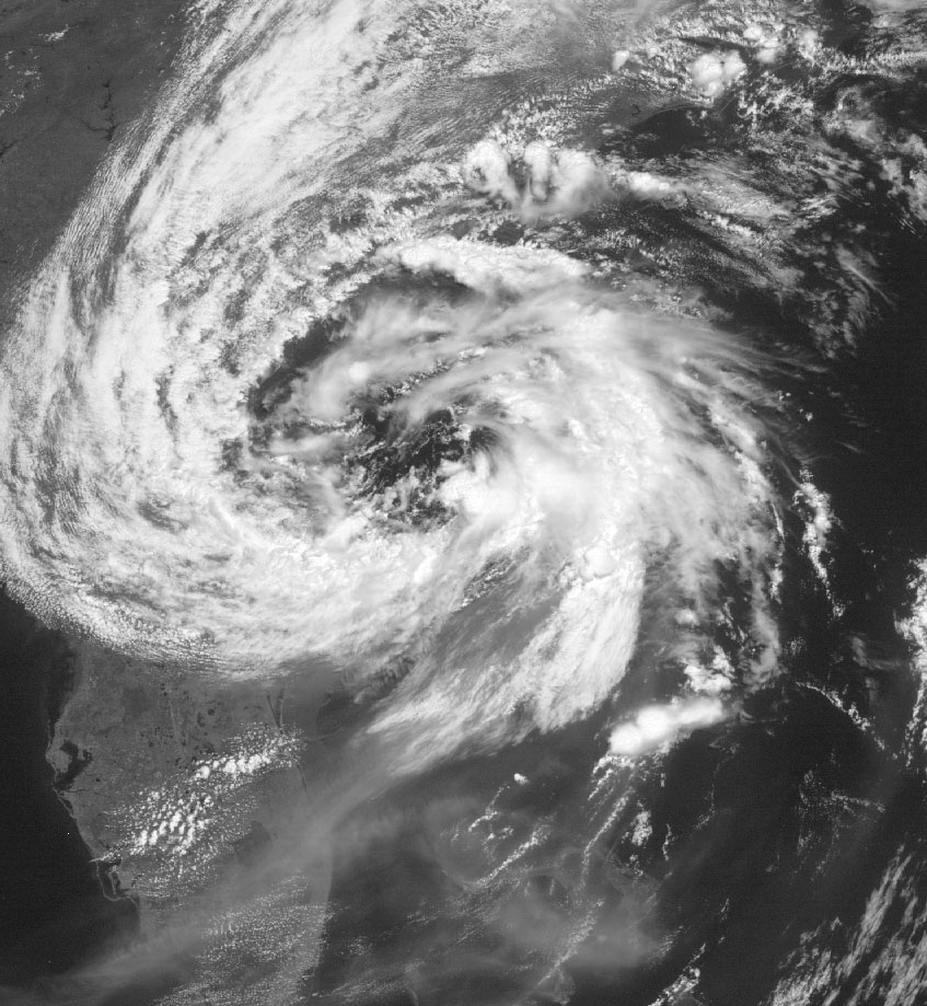 Subtropical Storm Andrea at 1615 UTC.